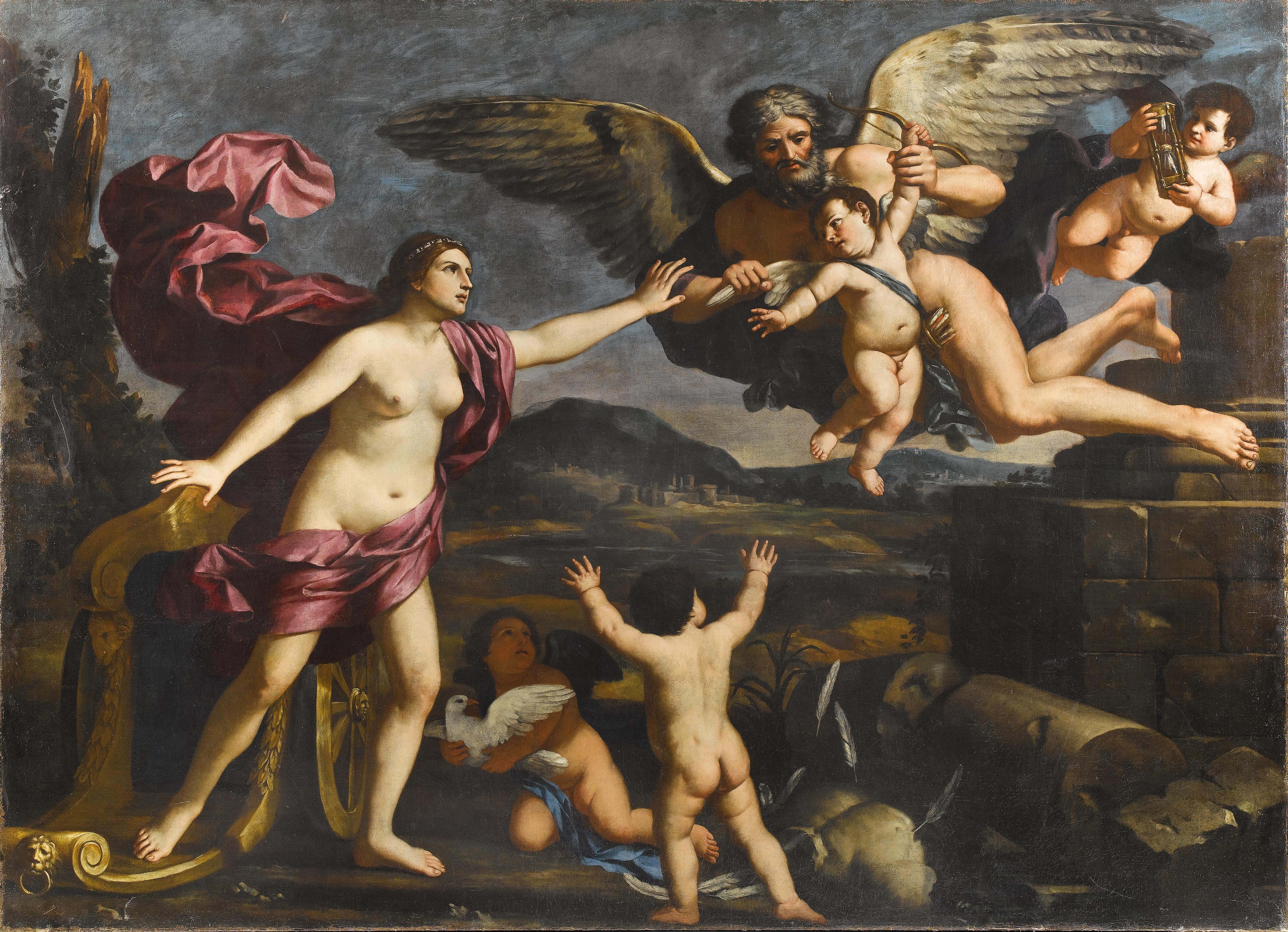 Venus, Cupido und Chronos; Öl auf Leinwand, 224 x 307,5 cm